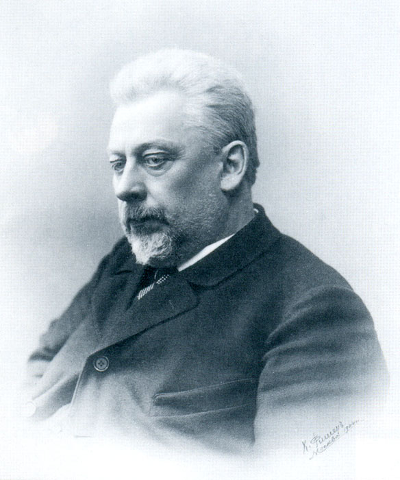 Актёр, режиссёр Александр Павлович Ленский